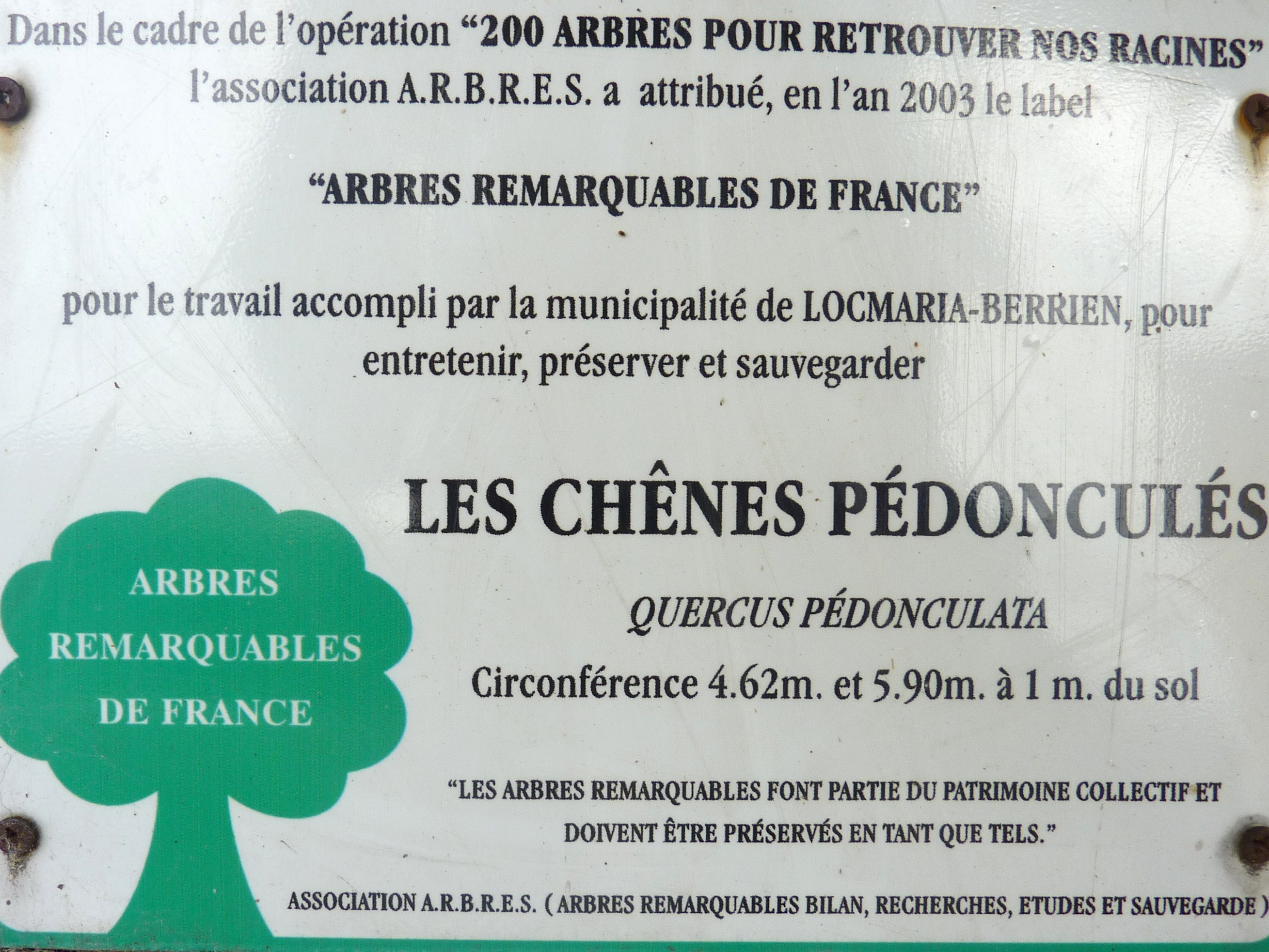 Locmaria-Berrien: panneau d'information sur les deux arbres classés "Arbres remarquables de France"